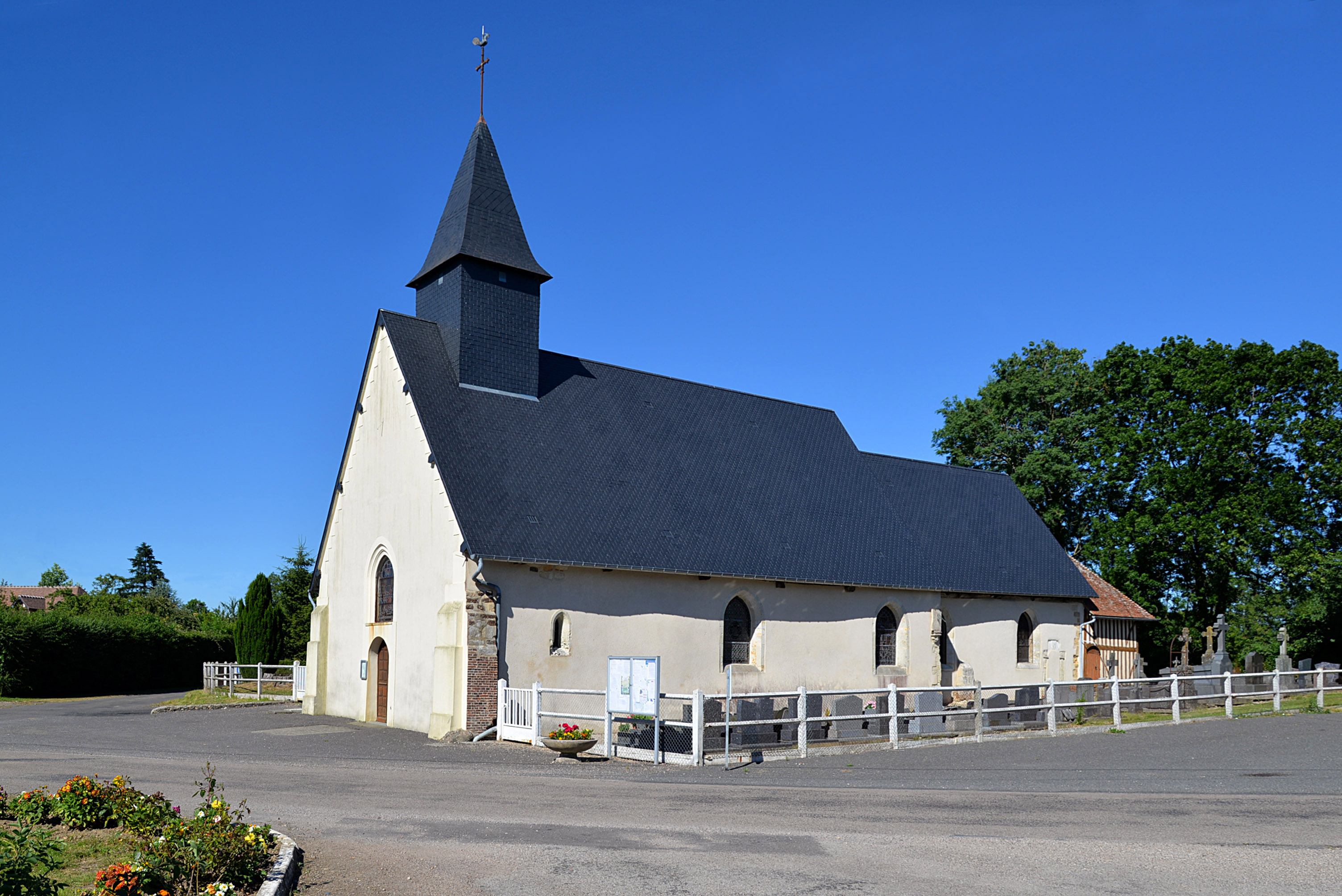 Cernay (Calvados)